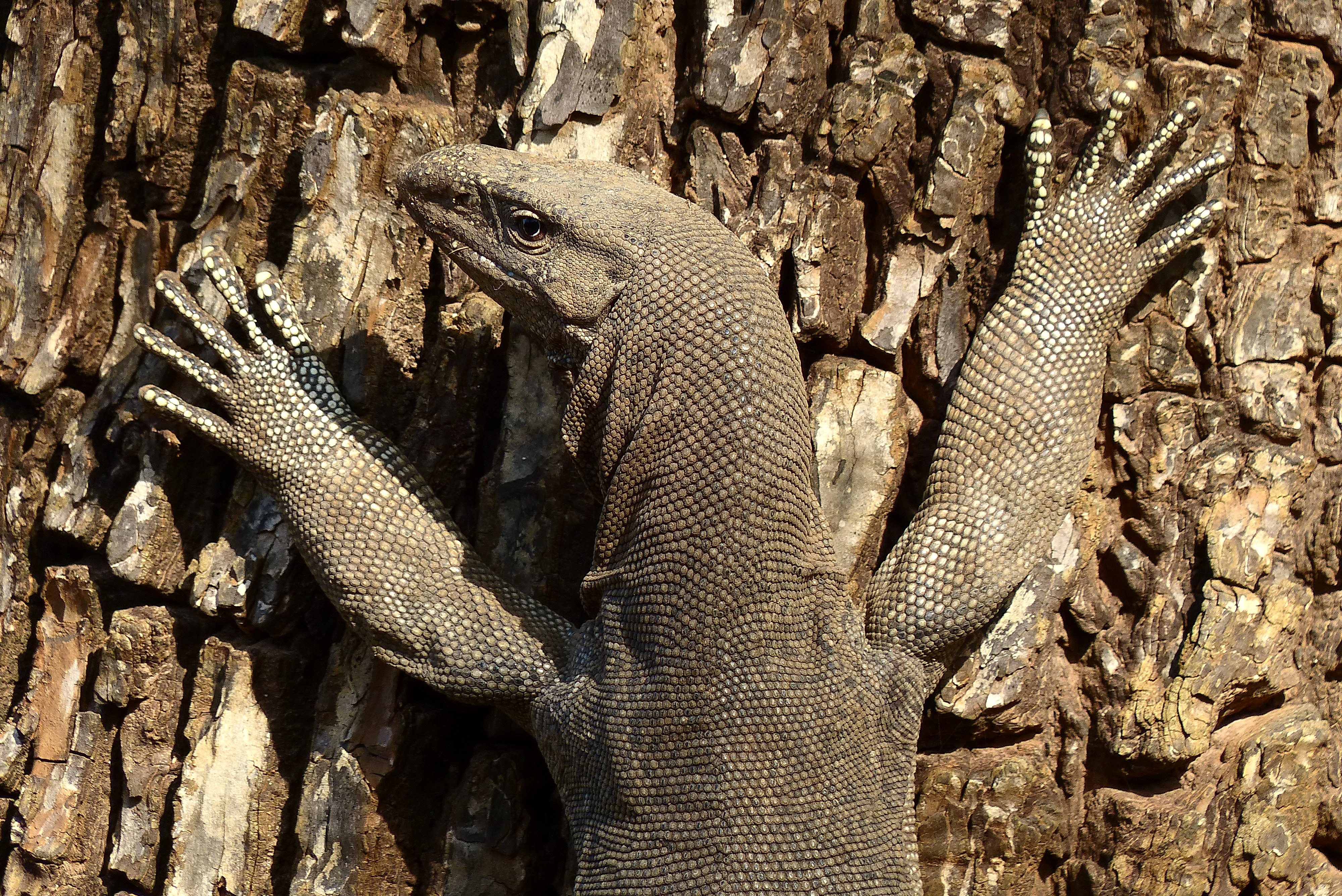 Bengalenwaran (Varanus bengalensis) im Yala Nationalpark, Sri Lanka